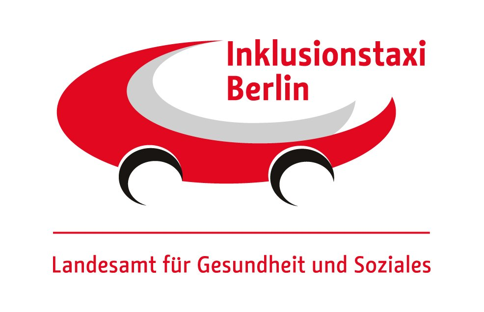 Logo vom Förderprogramm Inklusionstaxi Berlin im LAGeSo